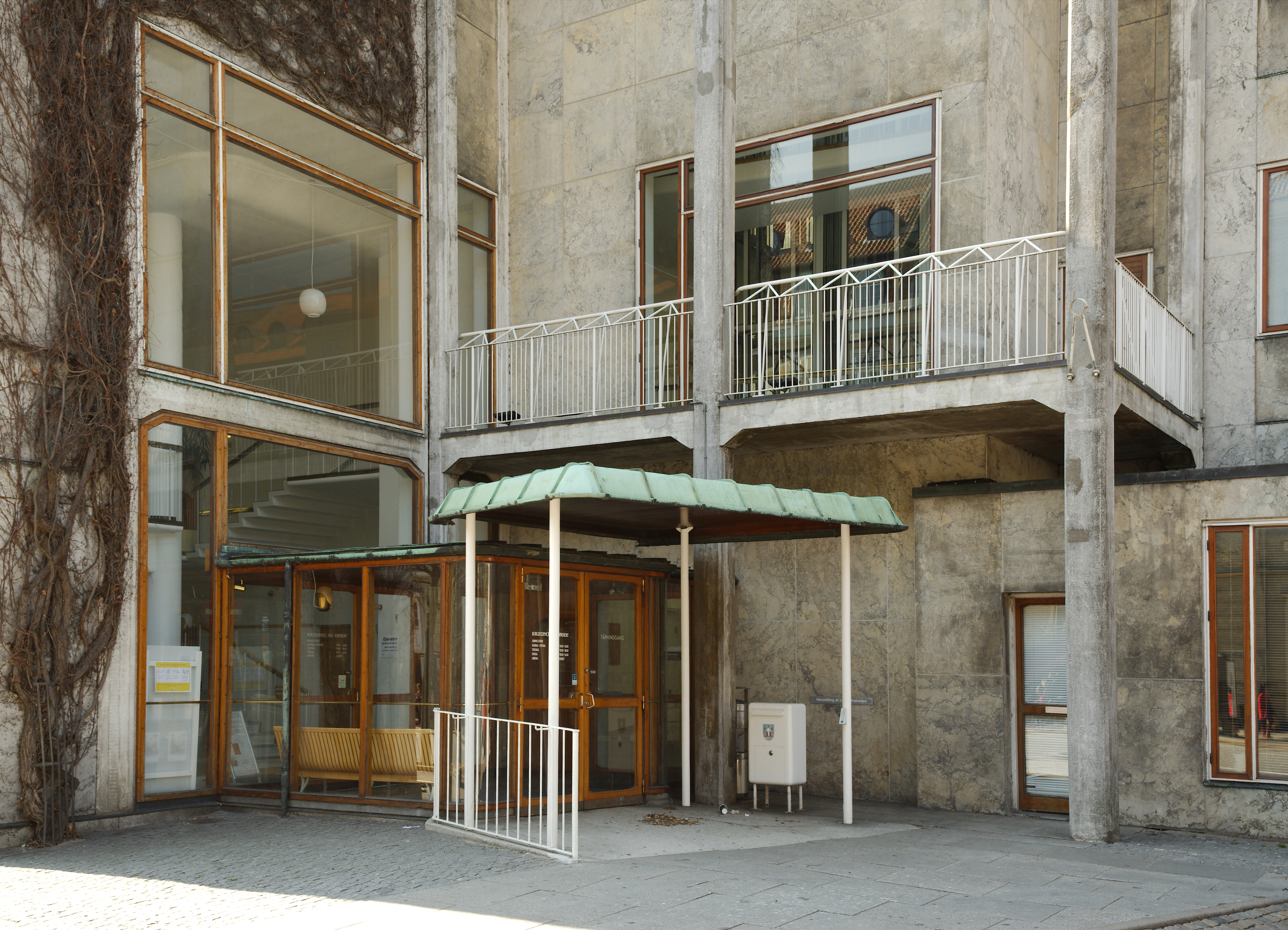 Tårnindgang til Århus Rådhus fra Park Alle